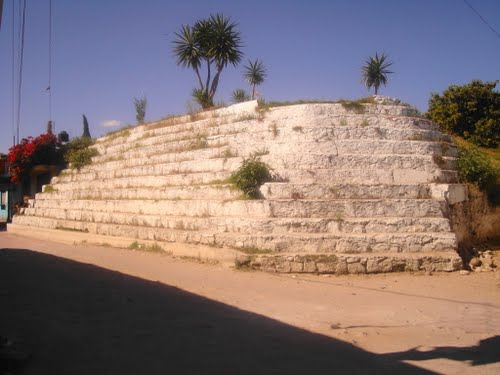 El cerrito, Zacatelco, Tlaxcala